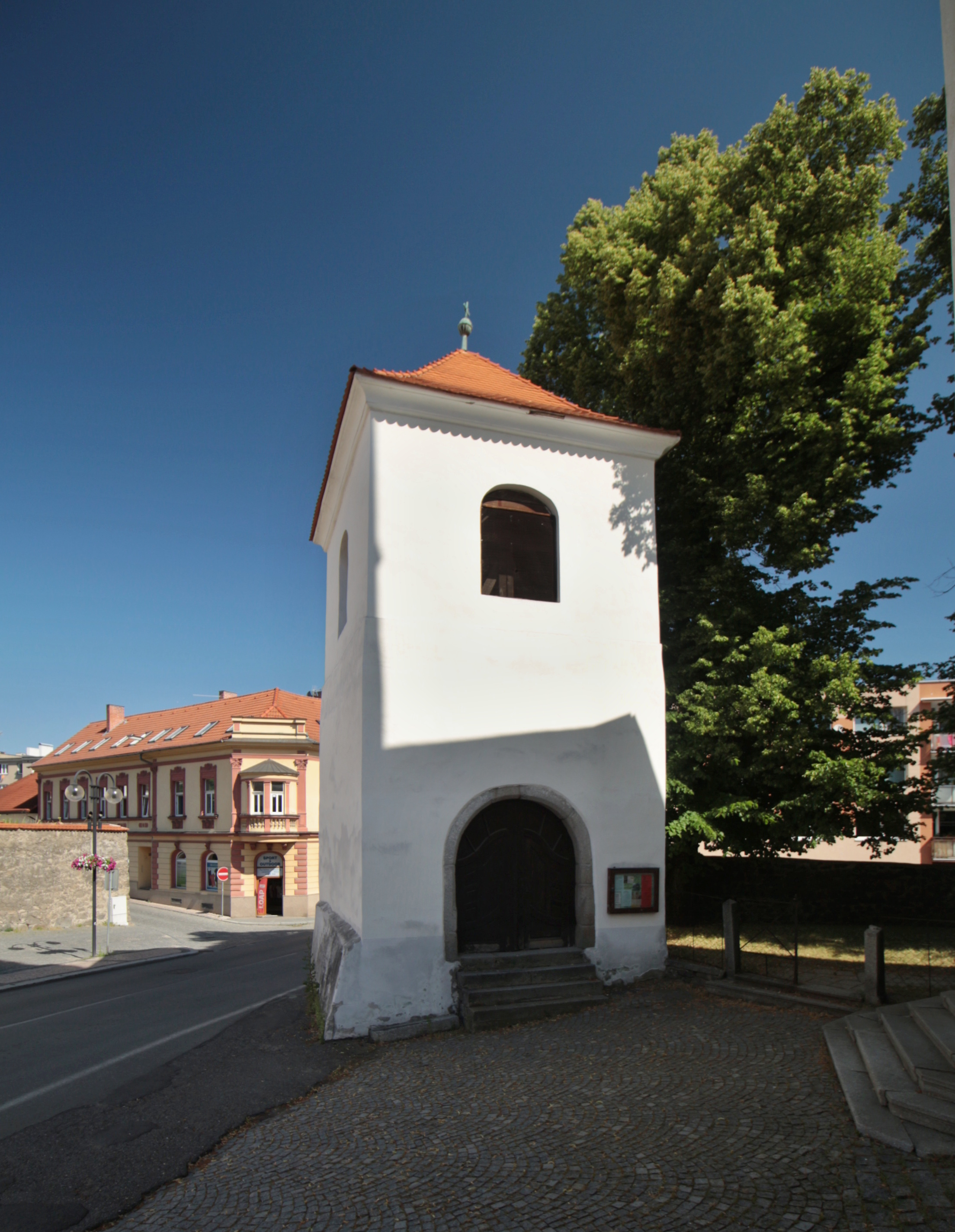 Sedlčany, kostel sv. Martina